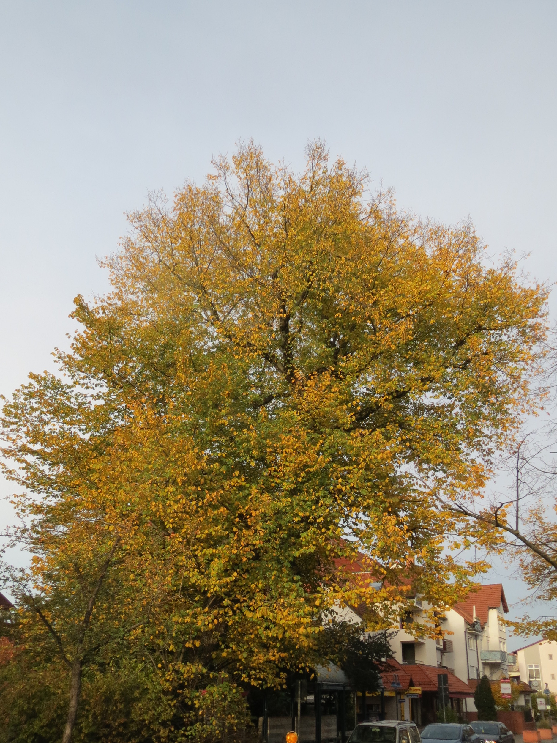 Bergulme (Ulmus glabra) in Hockenheim (Naturdenkmal)